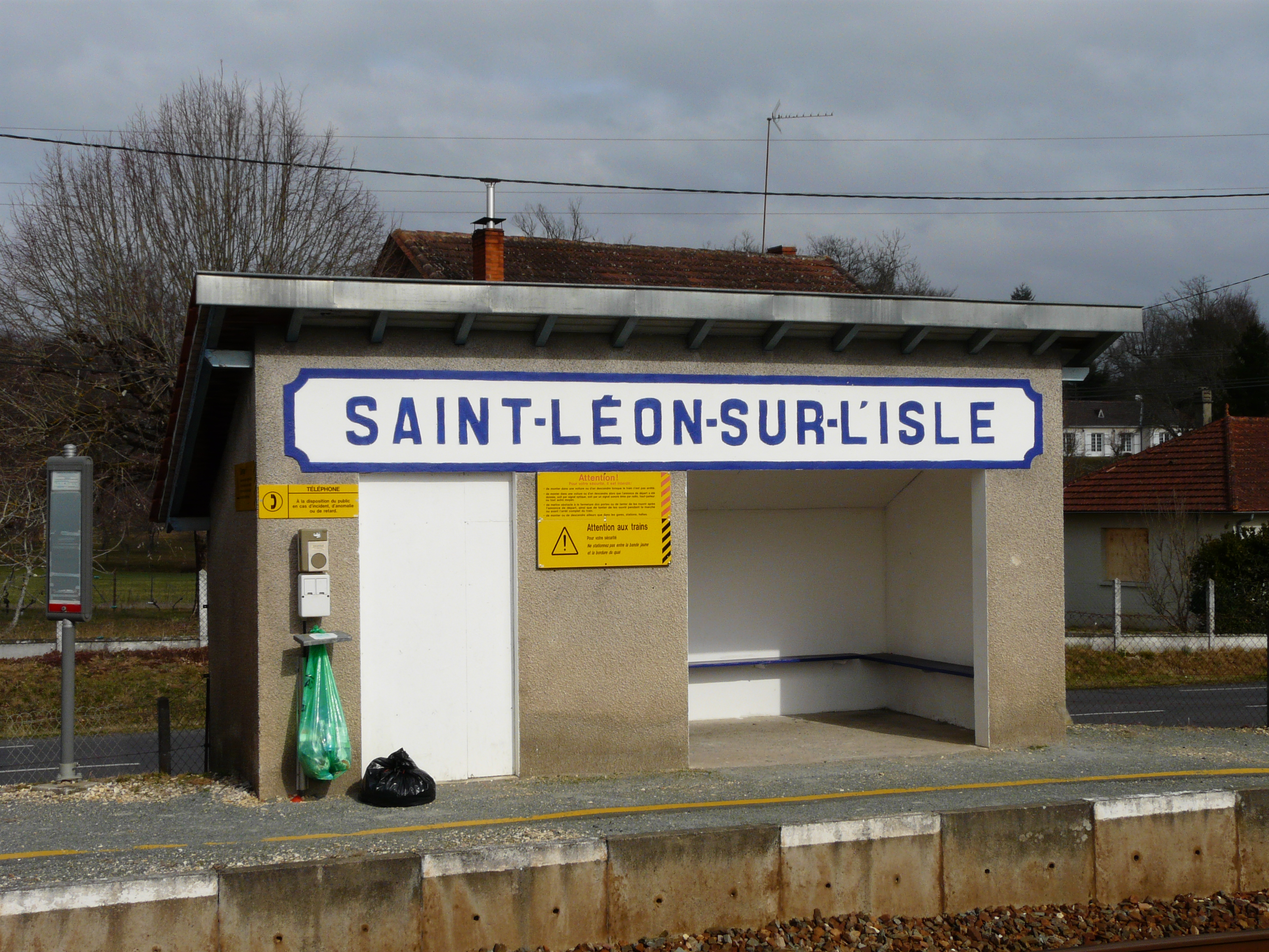 Abri voyageurs de la halte ferroviaire de Saint-Léon-sur-l'Isle, Dordogne, France.